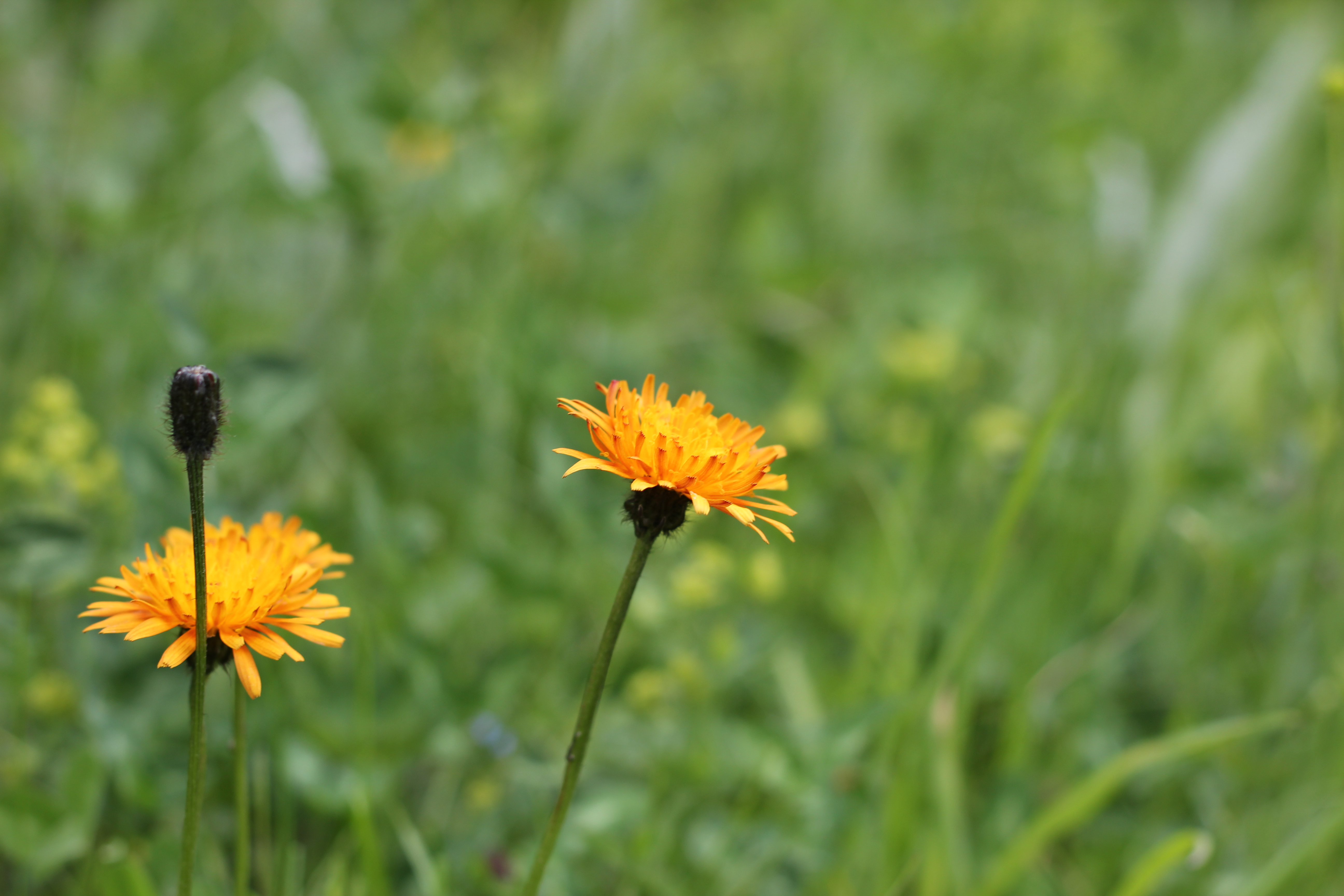 Gold-Pippau (Crepis aurea)